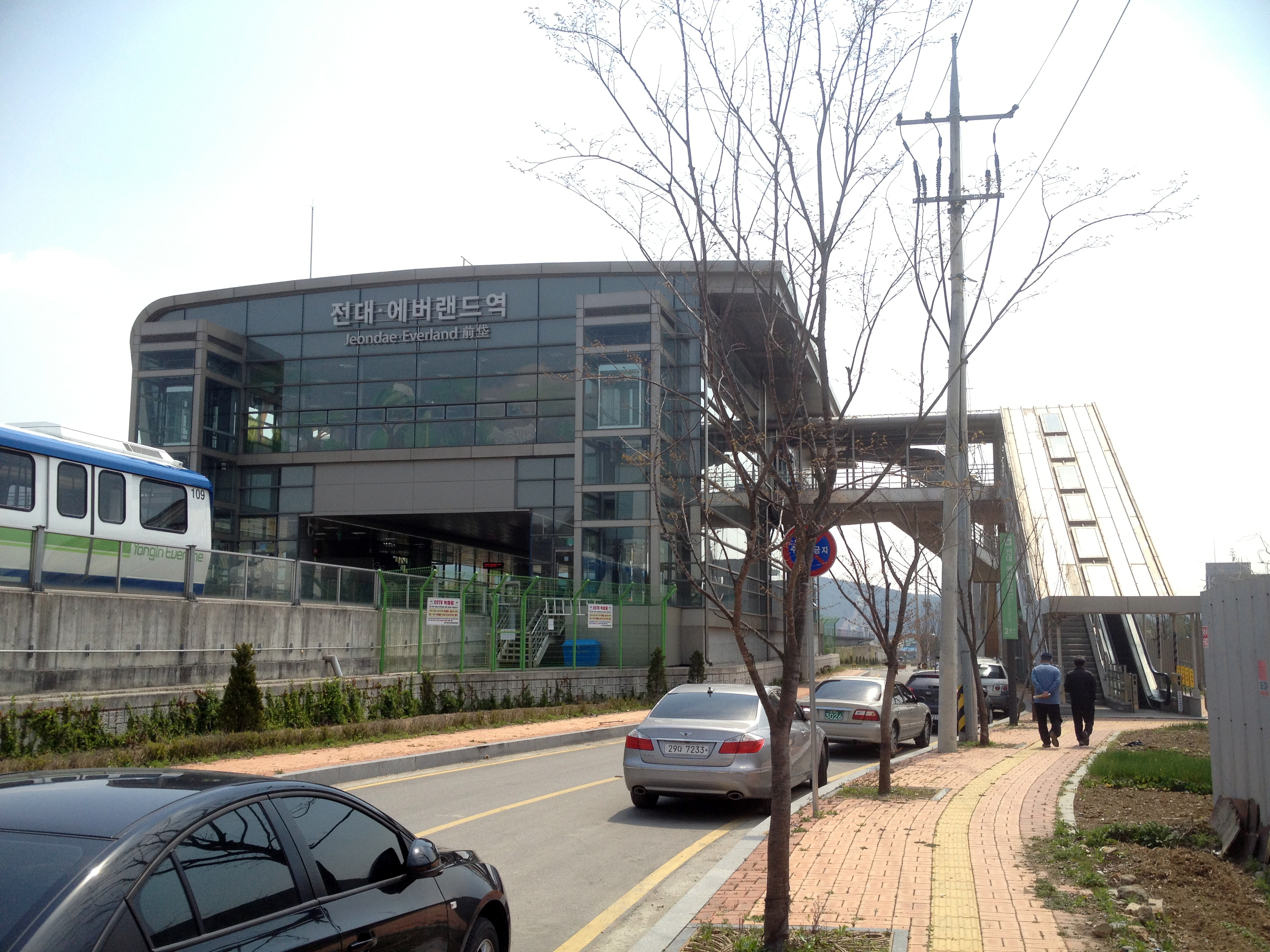 전대에버랜드역 역사